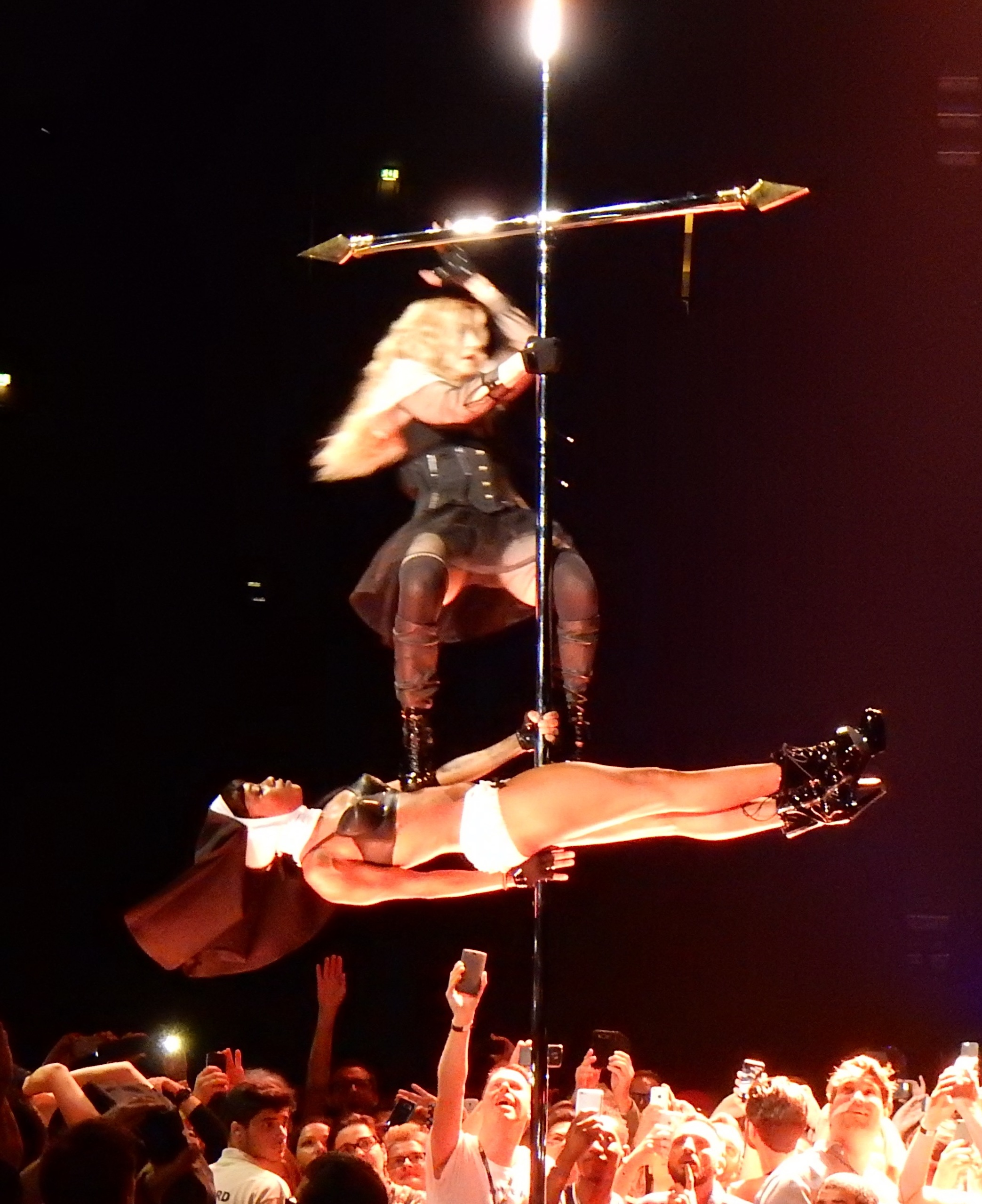 Madonna - Rebel Heart Tour Cologne 2